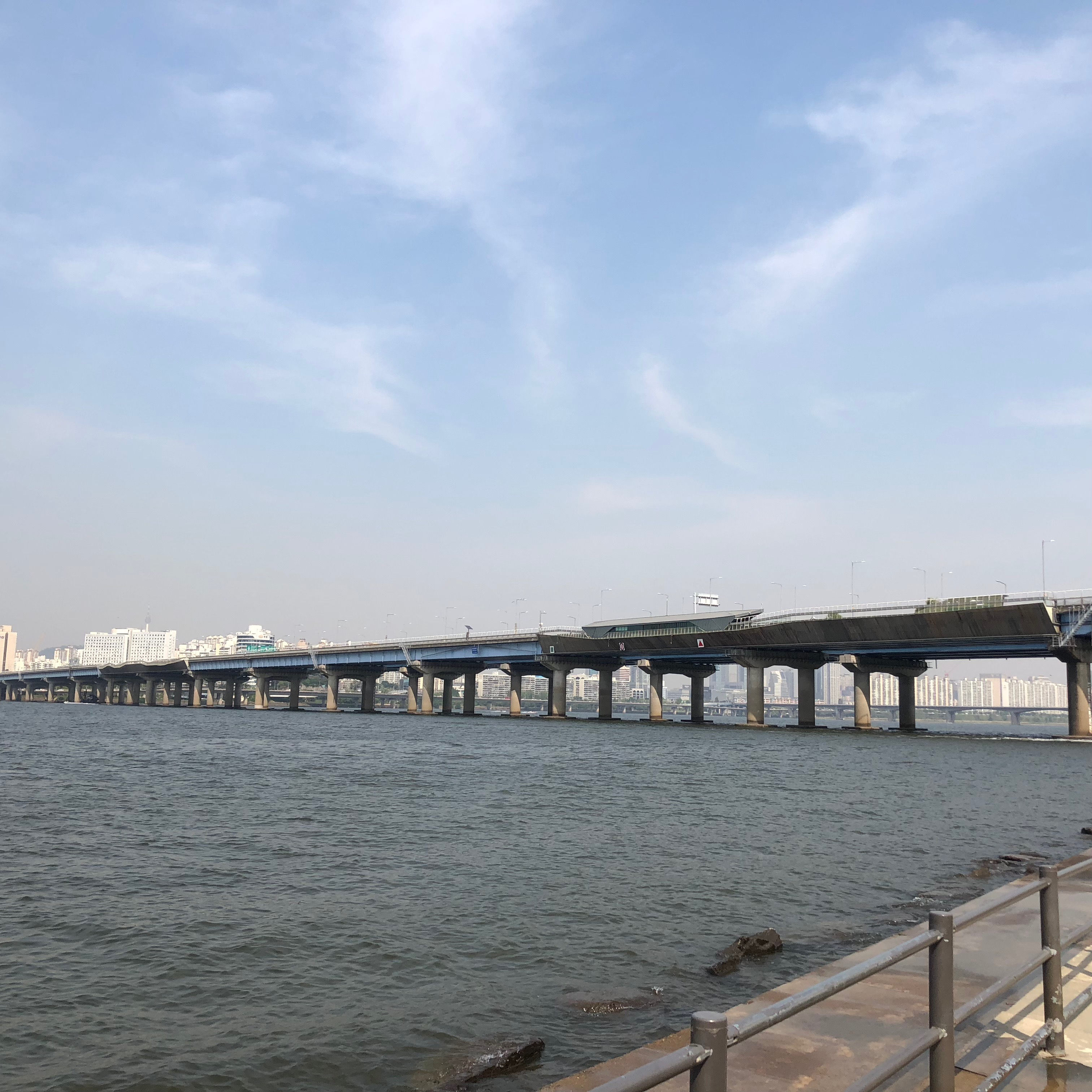 여의도지구